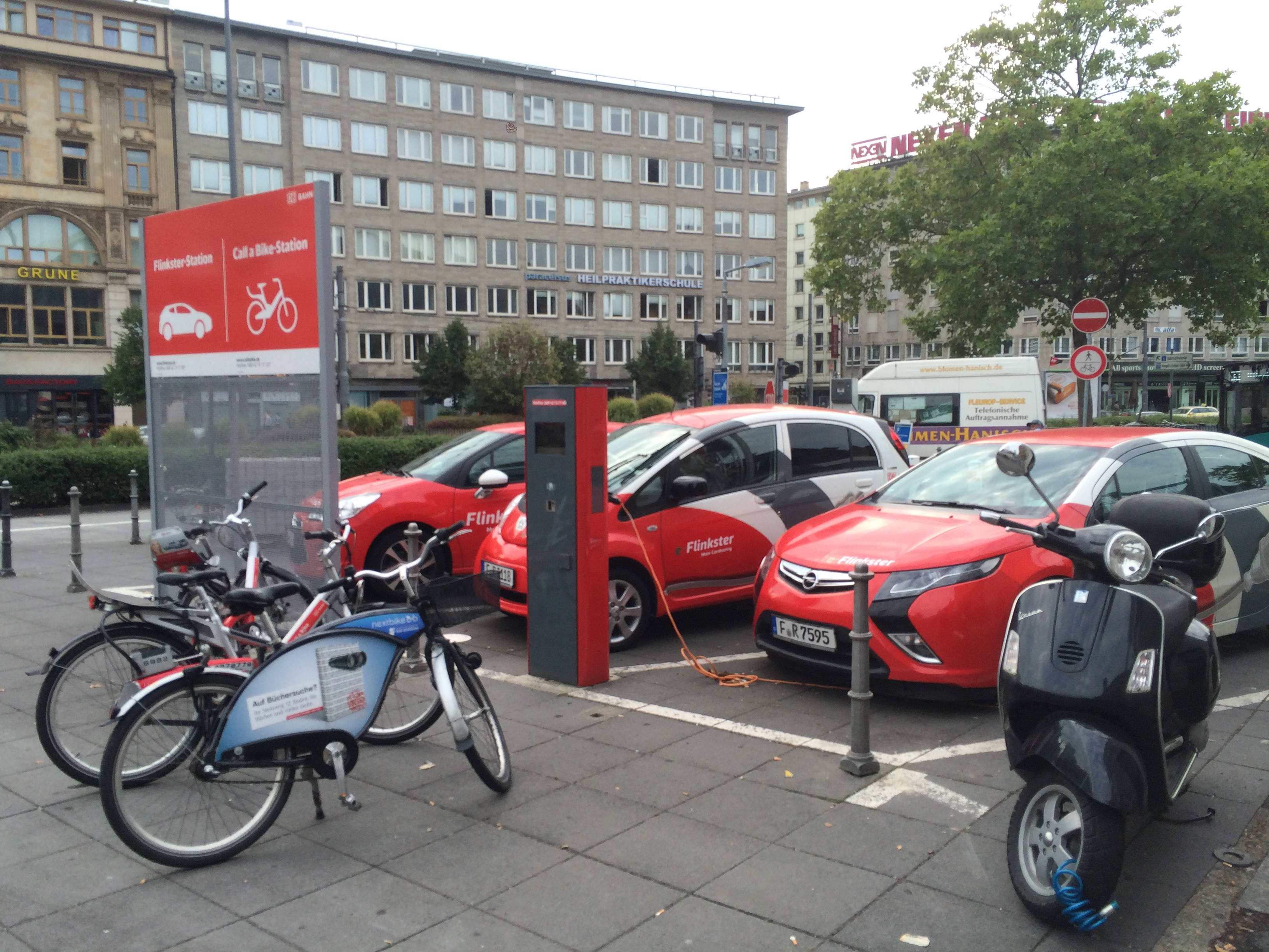 flinkster Station HBF Frankfurt